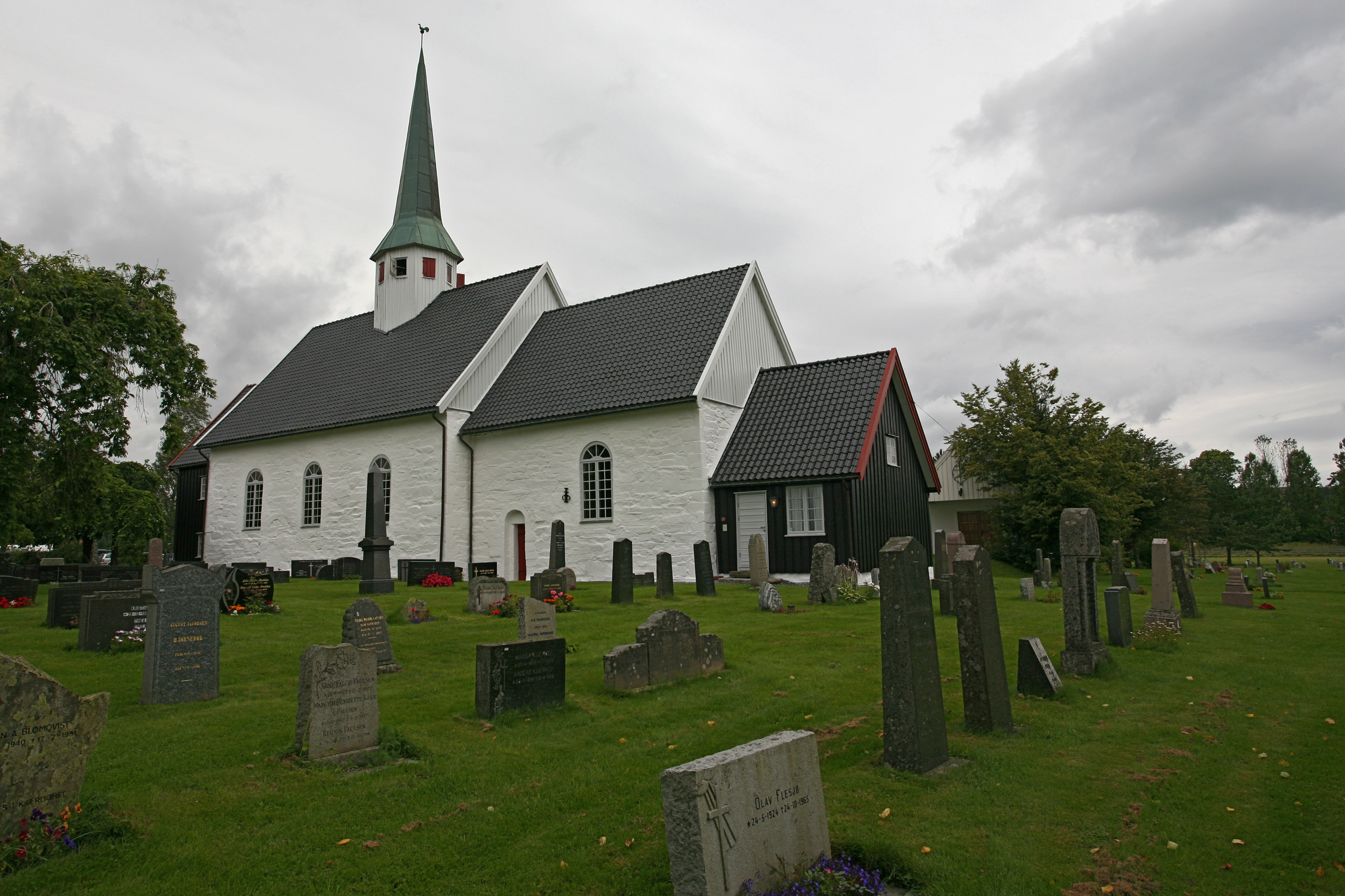 Picture of Våler kirke (Østfold - Norway)